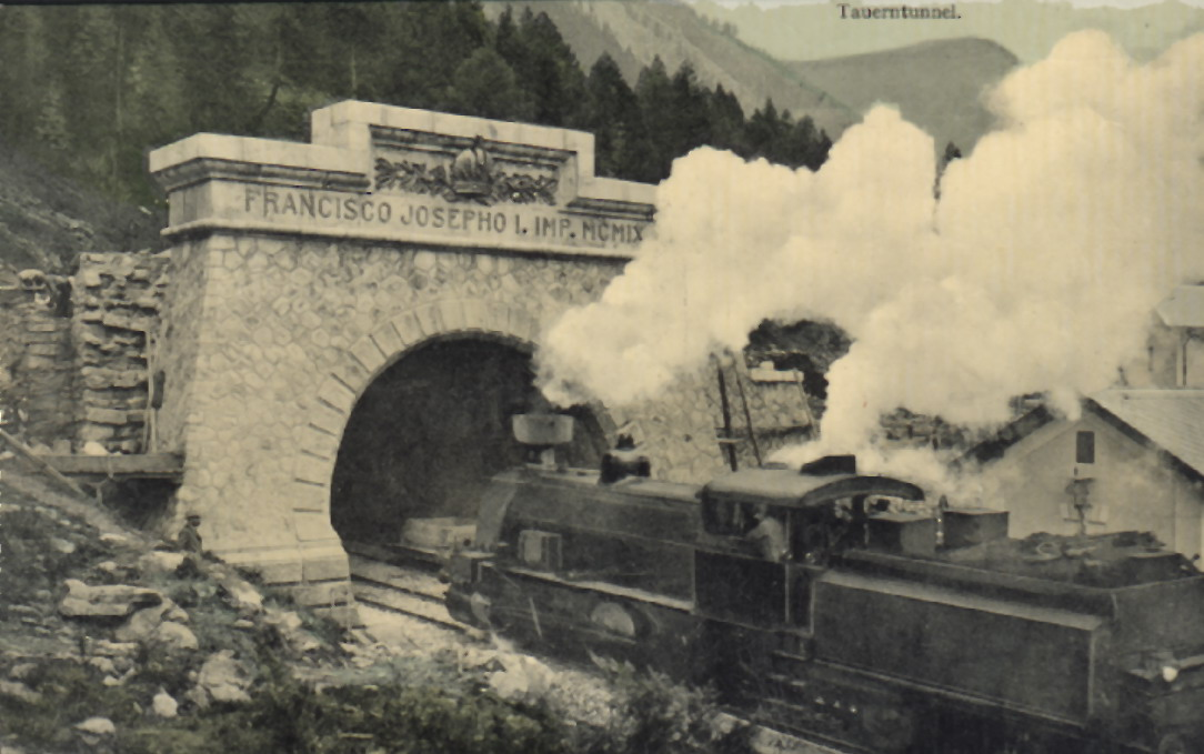 Tauerntunnelsuedportal ca.1911, Repro einer AK